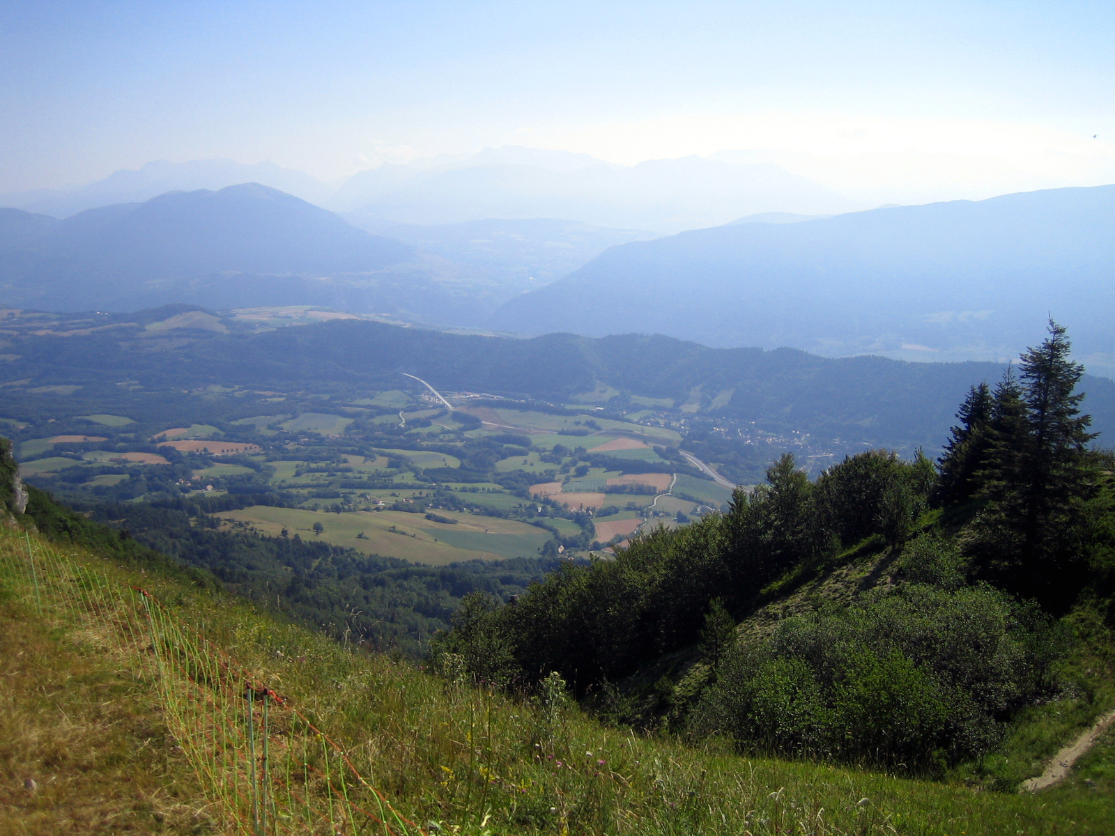 Monestier-de-Clermont (Isère, France) - Monestier-de-Clermont (vu depuis le Pas du Serpaton, commune de Gresse-en-Vercors). En juillet 2006, le viaduc autoroutier (visible ici) n'était pas encore en service.